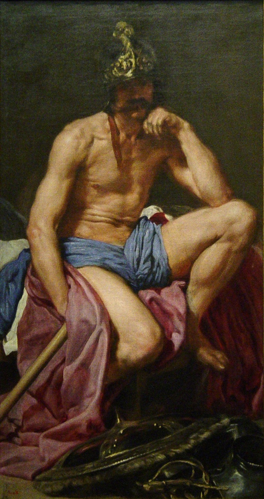 La obra representa a Marte, el dios de la guerra, y es una de las obras de temática mitológica del pintor sevillano Diego Velázquez.